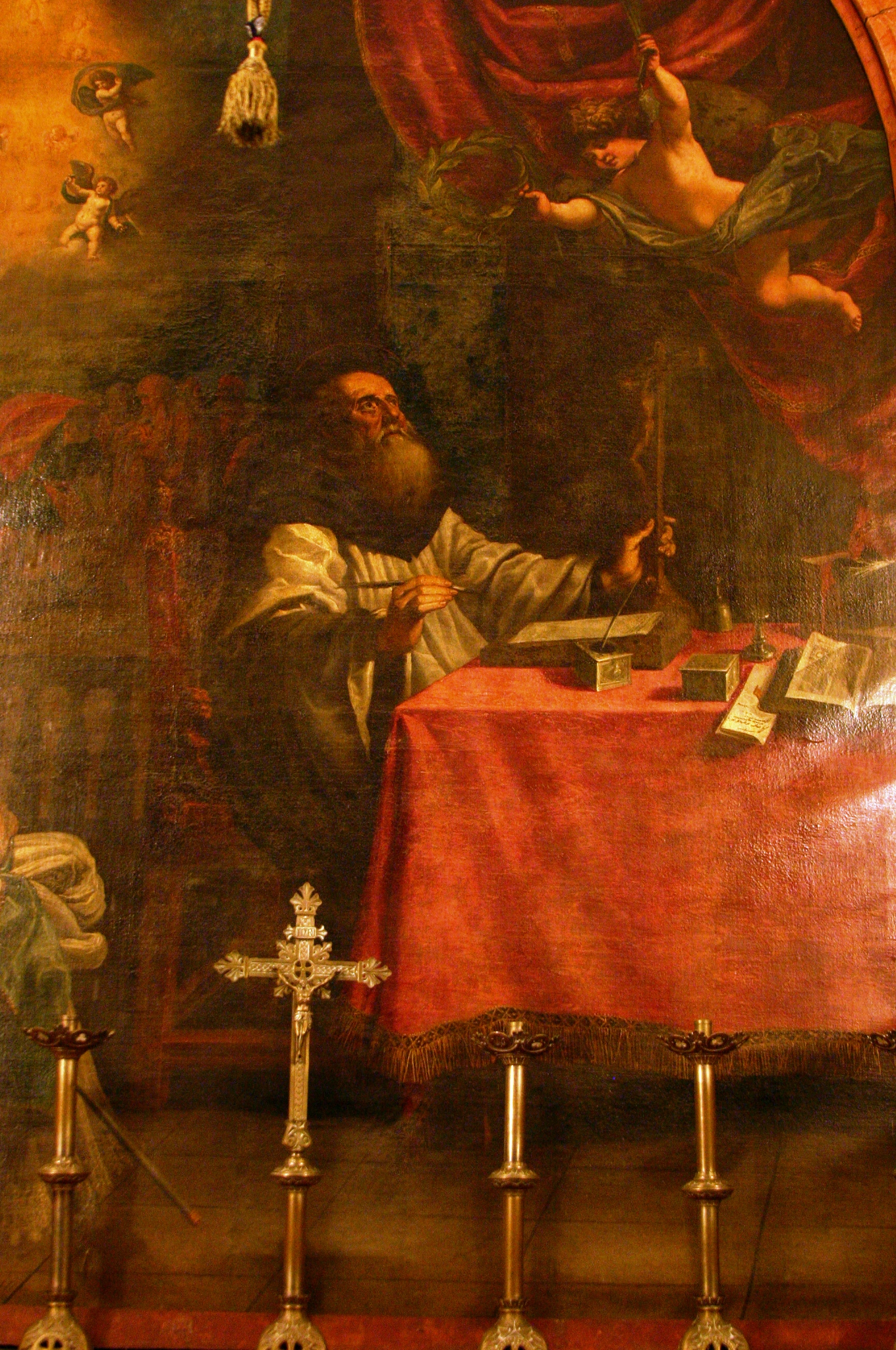 Santo Eulógio